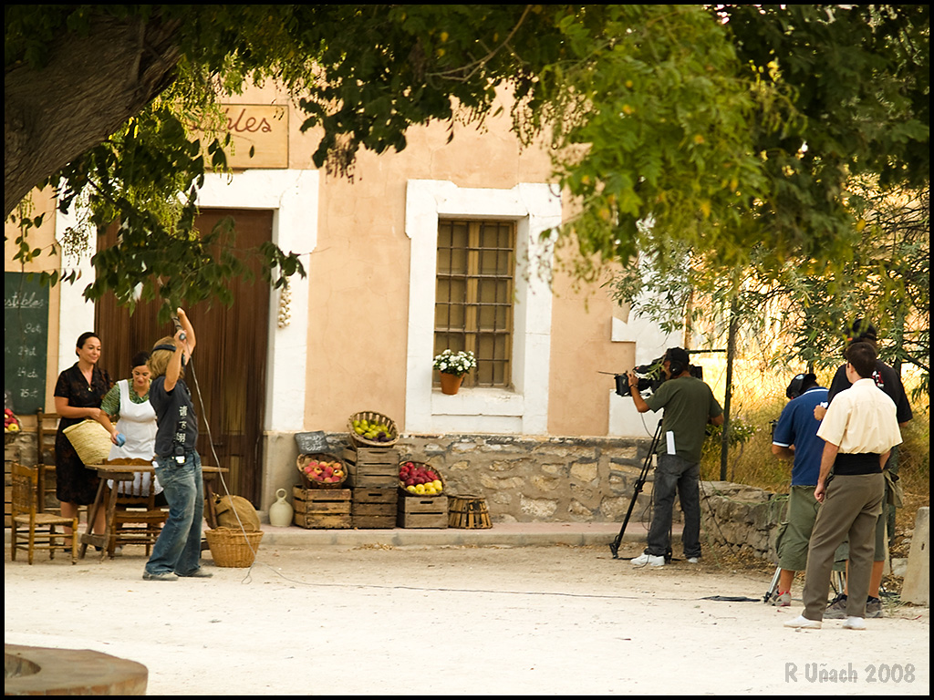 Un moment en el rodatge de la sèrie valenciana per a Canal 9 - RTVV "L'Alqueria Blanca" a el llogaret de la Colonia de Santa Eulàlia (Saix-Villena)